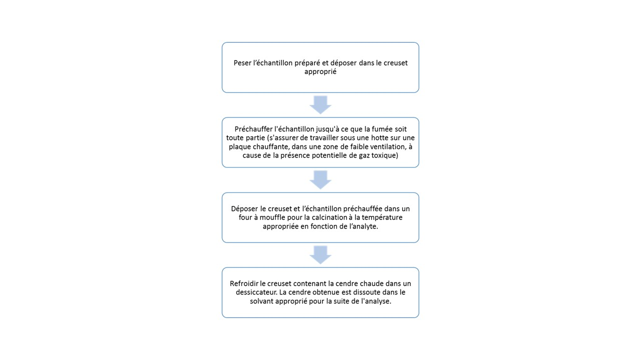 Schéma représentant les étapes de l'extraction des métaux par calcination